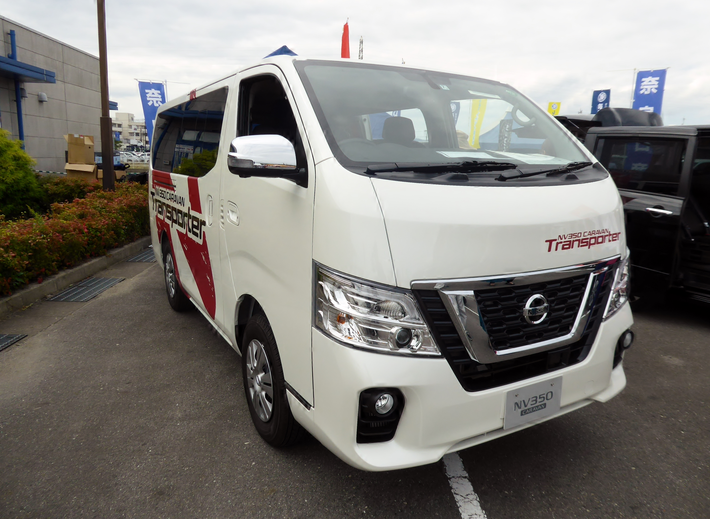 CBF-VR2E26型日産・NV350キャラバントランスポーターをフロントから撮影。